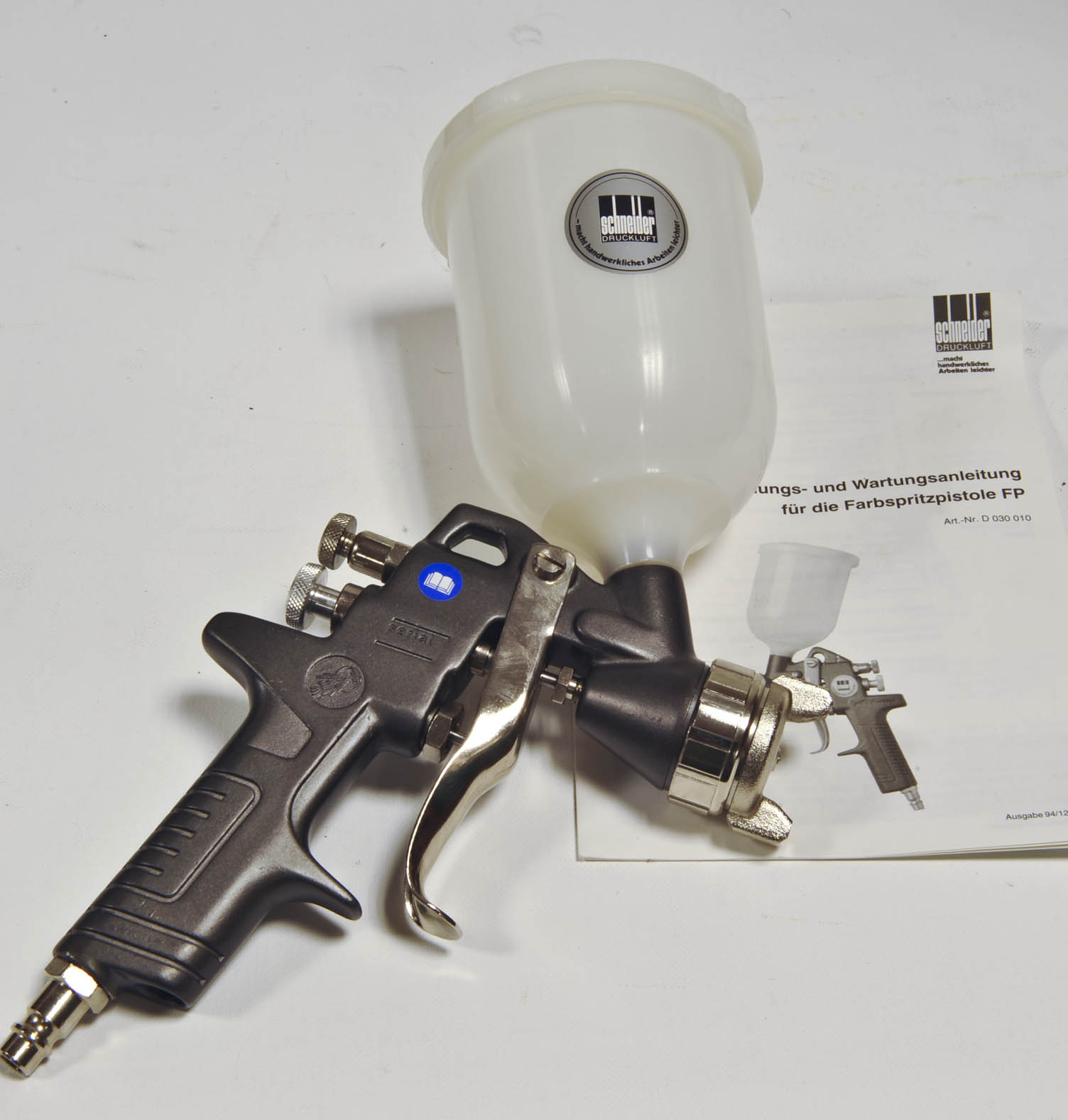 Airbrush by Schneider